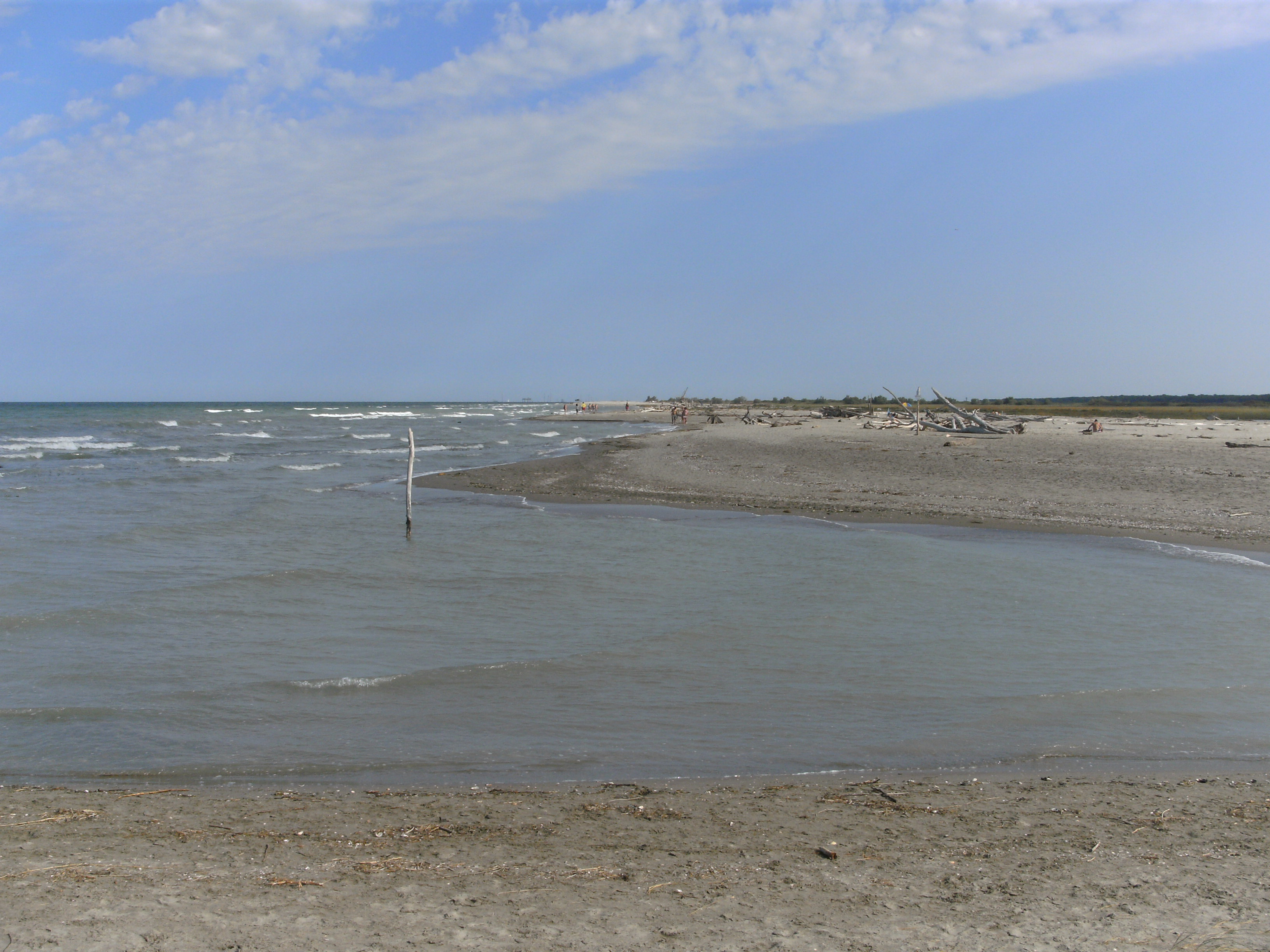 Lino di Spina (Comacchio, Fe), Strand neben dem Naturschutzgebiet am südlichen Ortsrand